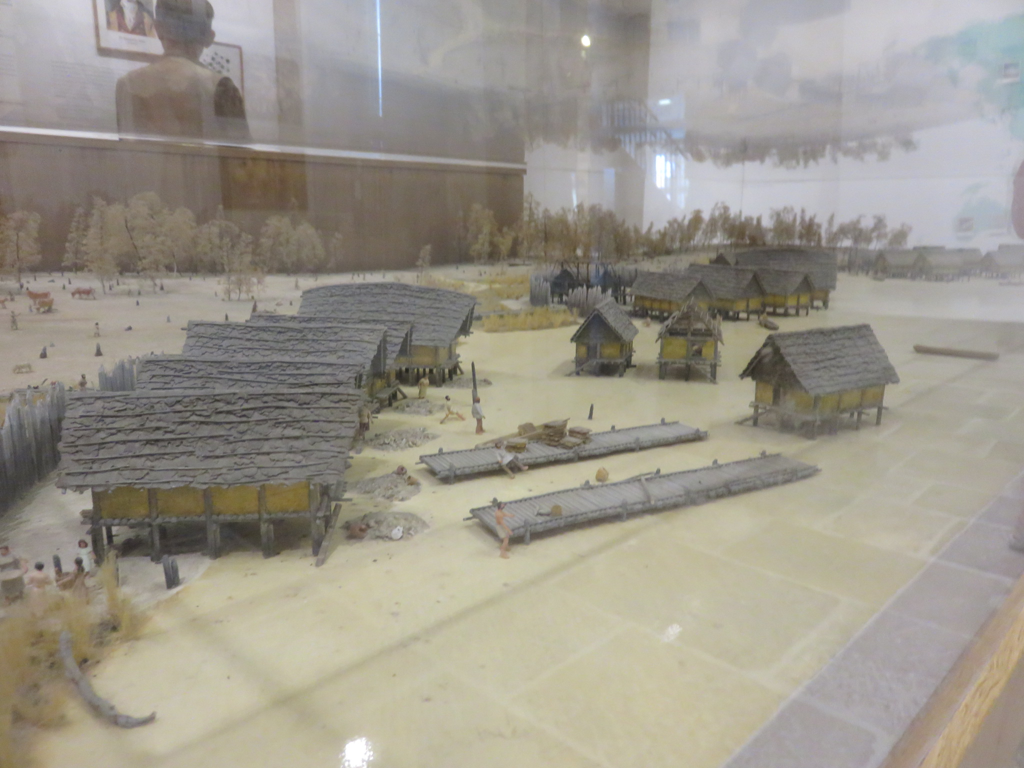 Reconstitution d'une cité lacustre Néolithique des lacs de Chalain et de Clairvaux dans le Jura